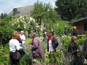 Offene Gartenpforte 2008 bei Knaak´s